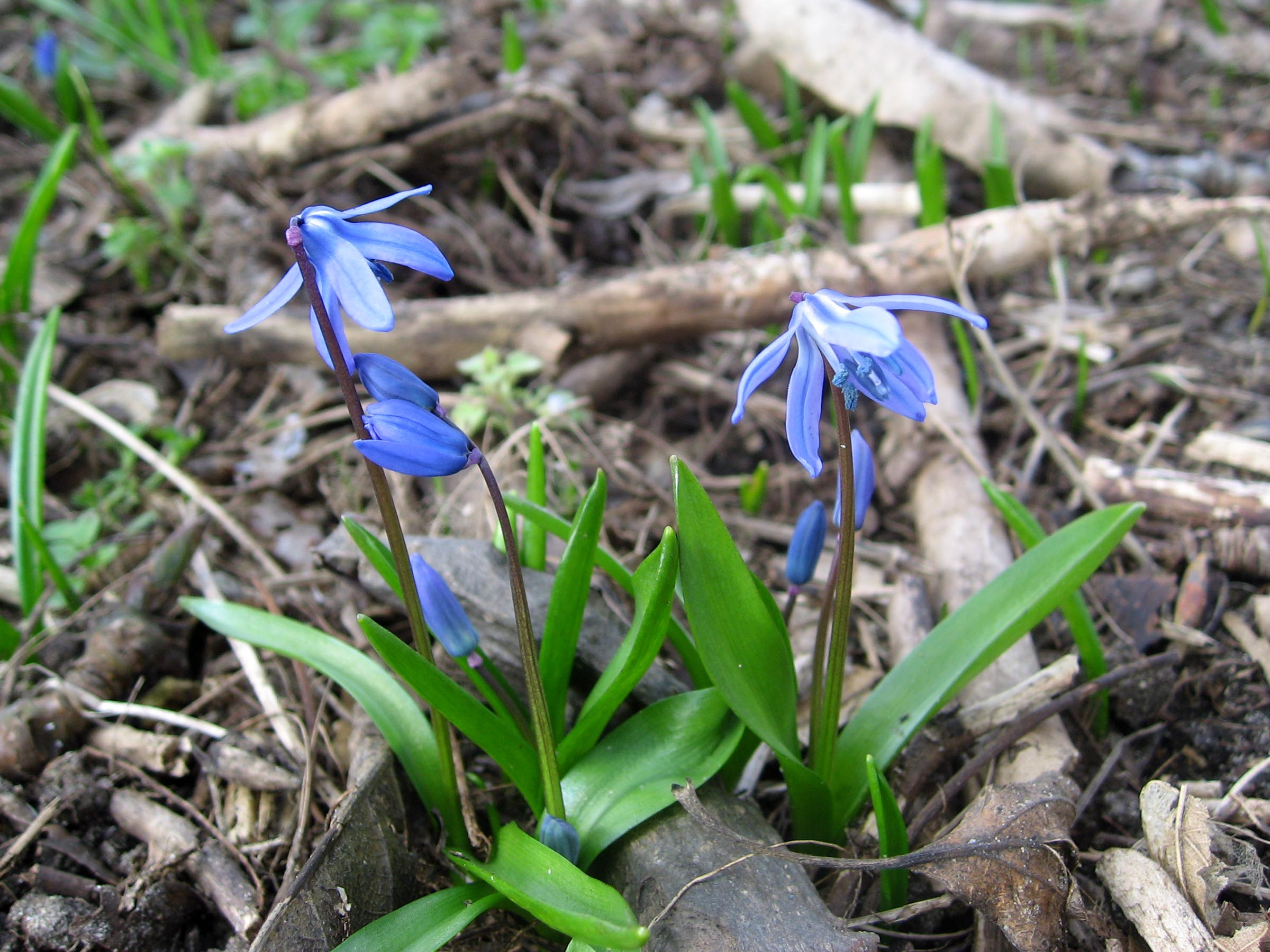 Sibirischer Blaustern (Scilla siberica) im Wald